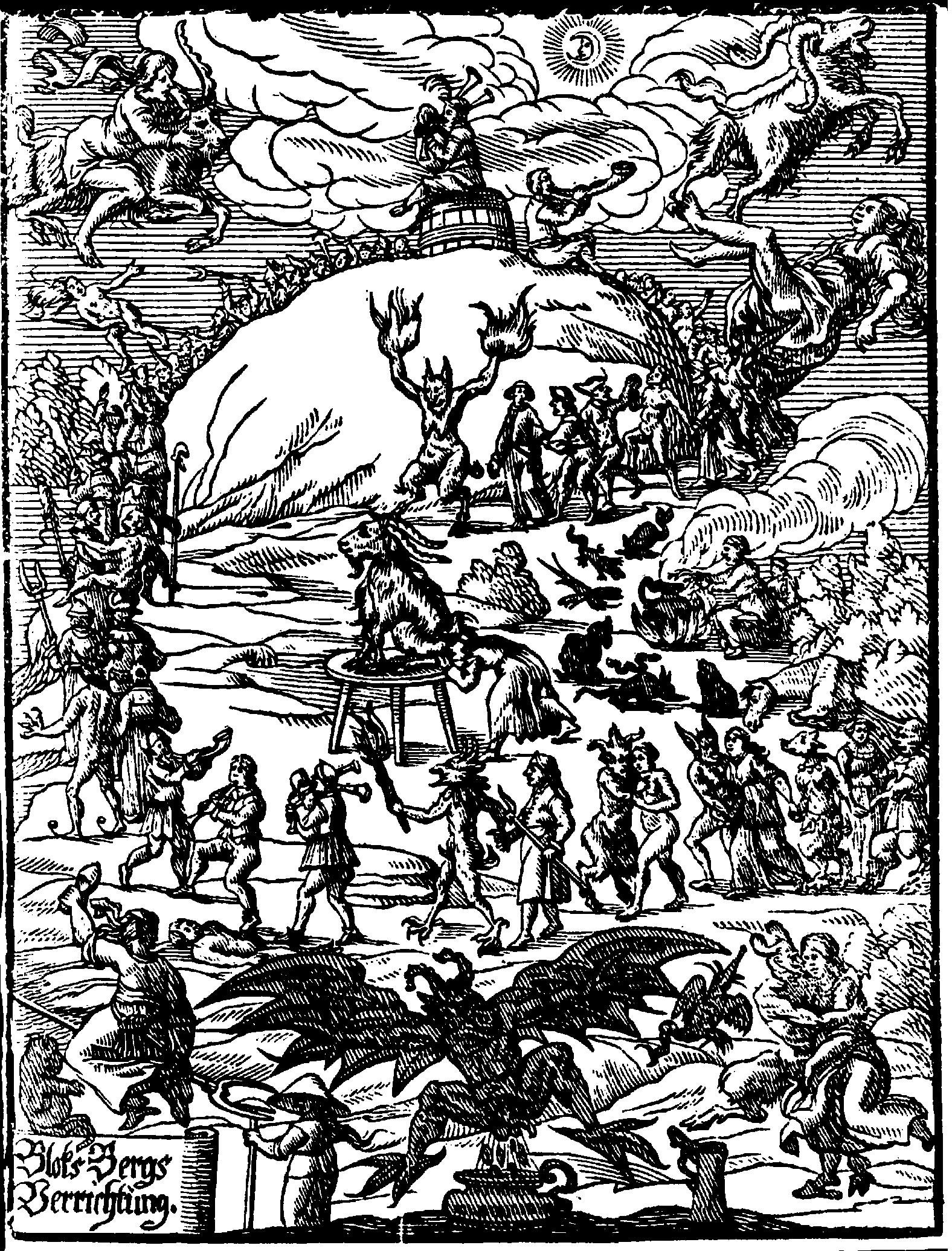 Witches' Sabbath - Johannes Praetorius: Blockes-Berges Verrichtung, Leipzig u.a. 1668 (VD17 3:015601X)